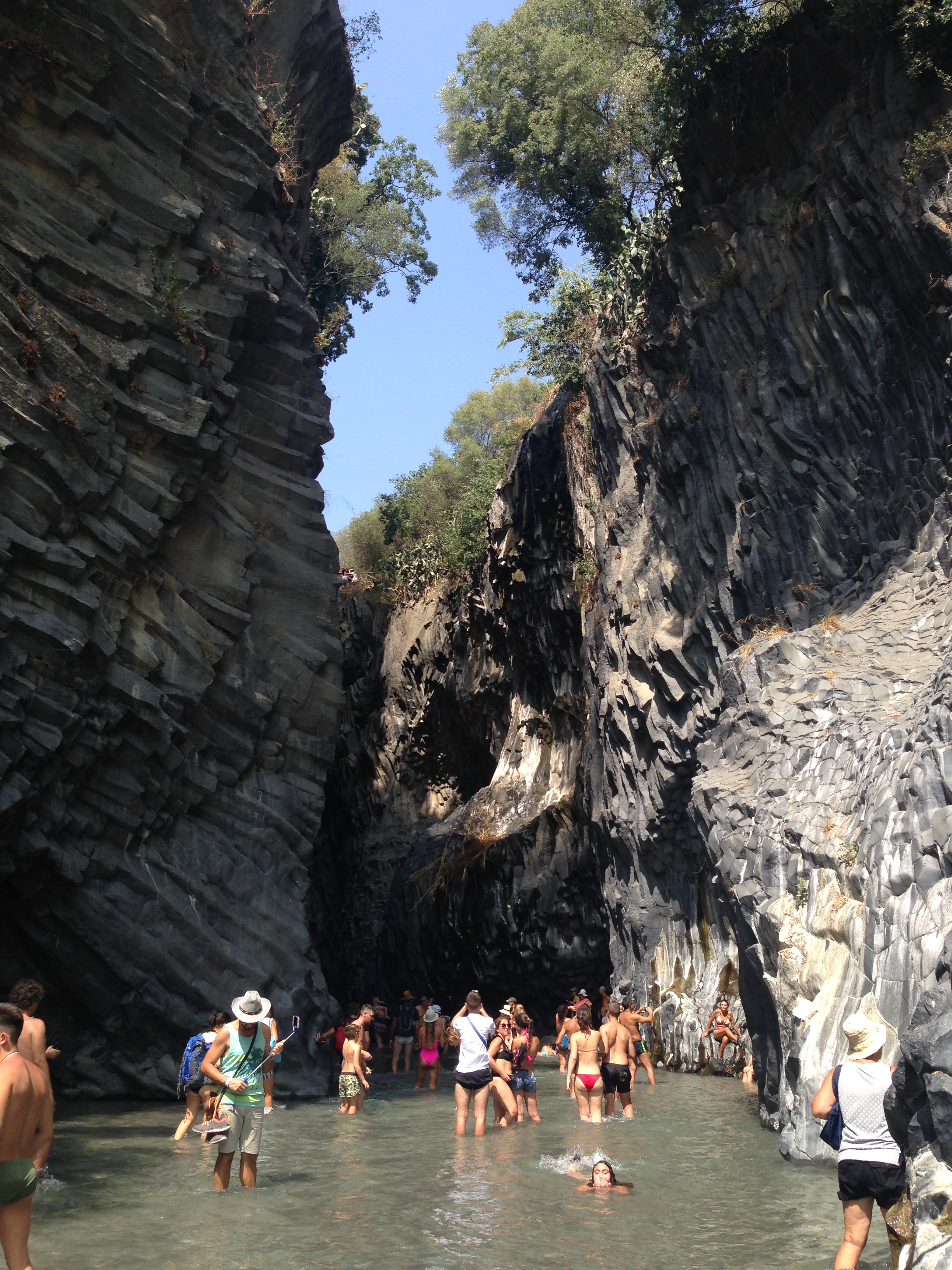 Gole Alcantara